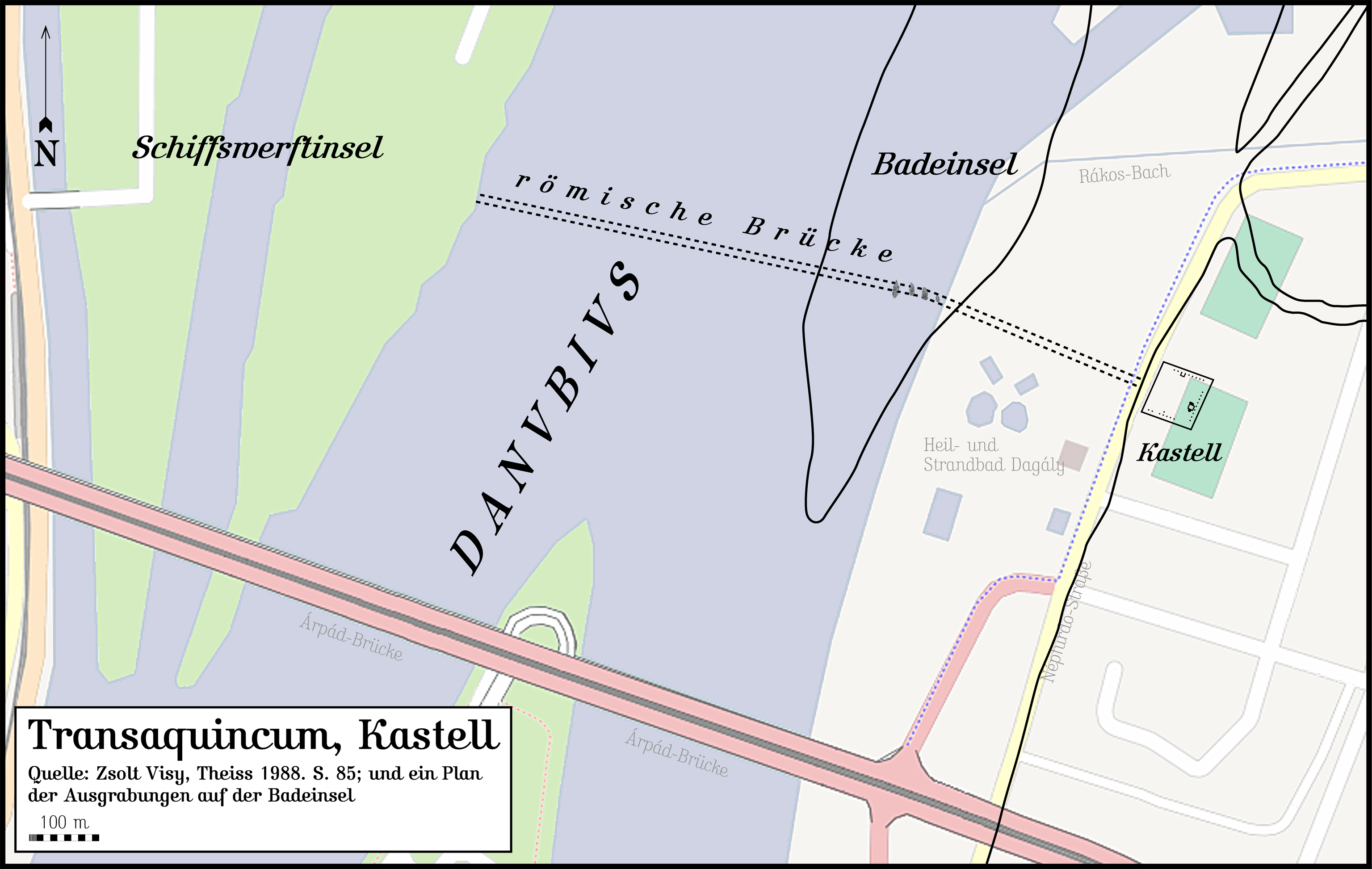 Transaquincum. Das möglicherweise in der Antike „Contra Aquincum“ genannte Kastell mit der 1874–1875 abgebaggerten Badeinsel und der Römerbrücke. Quellen: Zsolt Visy, Theiss Verlag 1988, S. 85 sowie der vor 1874 gezeichnete Plan der römischen Brückenpfeiler. Hintergrundkarte aus dem freien Internetprojekt [1]. Gezeichnet in FreeHand MX für Macintosh; abgespeichert in Adobe Photoshop CS.